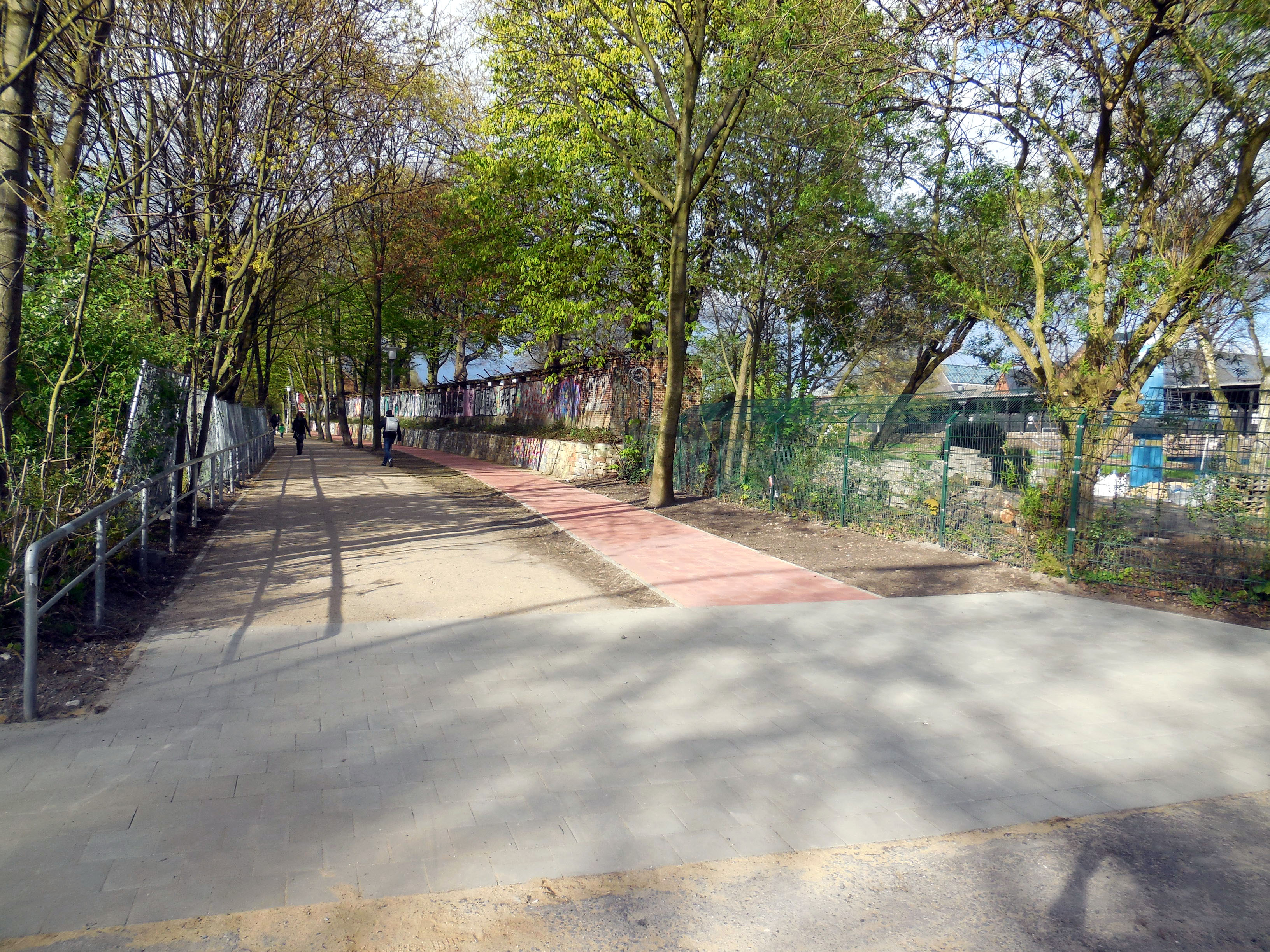 Ufer des Isebekkanals, 53°34'15 / 09°57'42